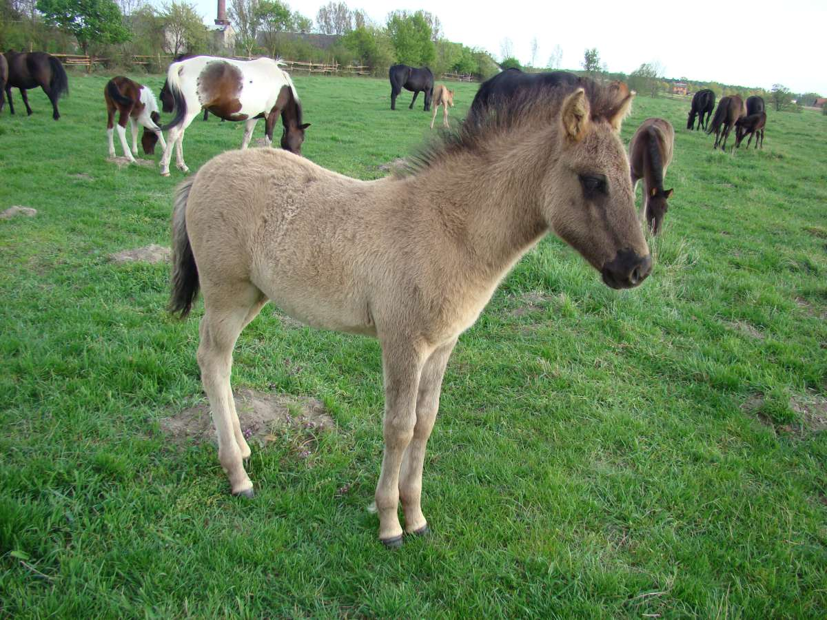 Źrebak konia huculskiego ze stadniny w Grodźcu Wlkp. Widać charakterystyczną pręgę u młodej klaczki. Konie te rodzą się przede wszystkim zimą, w temperaturach dochodzących do -30'C. Powoduje to, że są one zahartowane i bardzo odporne na choroby i zmiany temperatury.